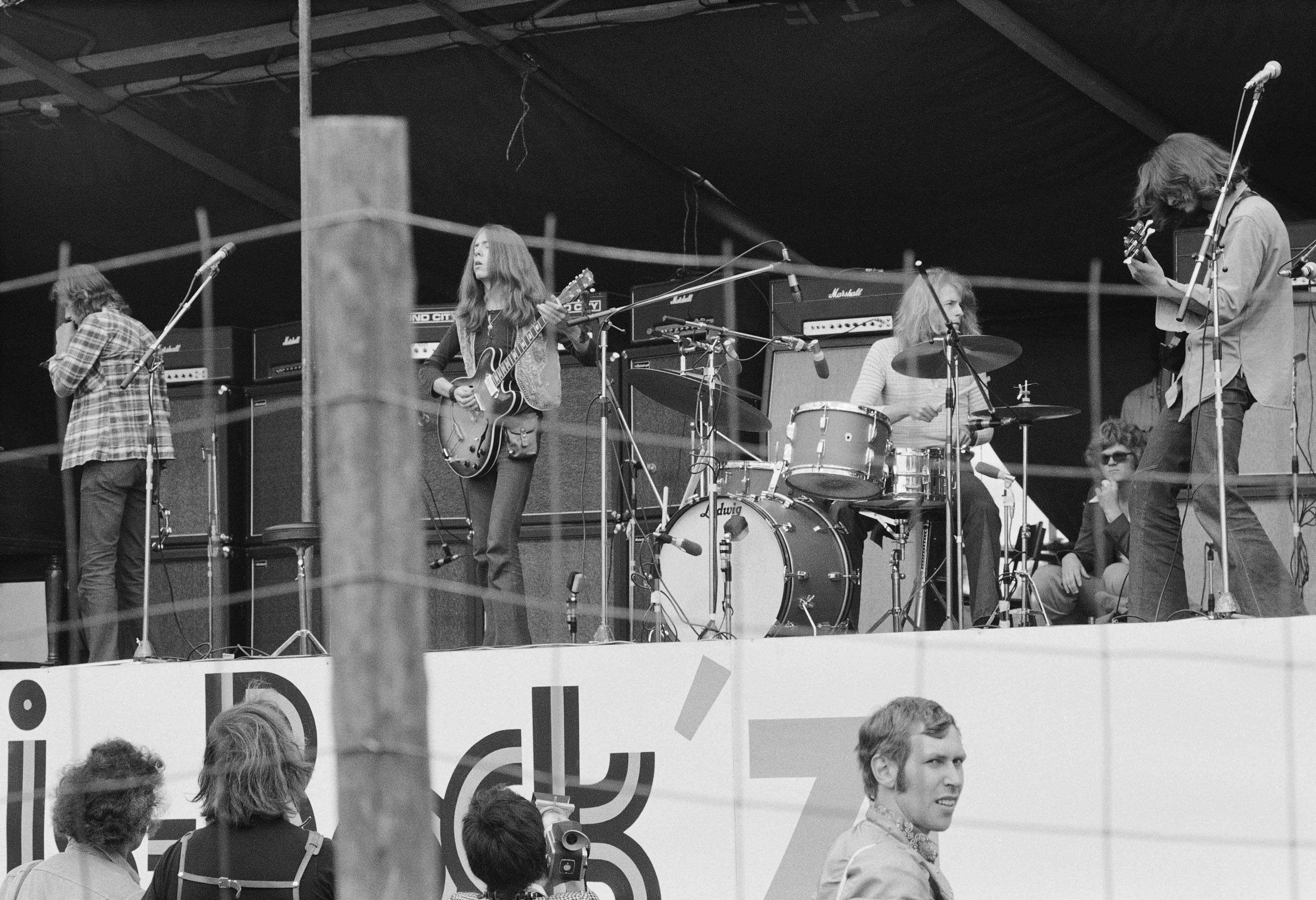 Tasavallan Presidentti -yhtye Ruisrockissa 1971.